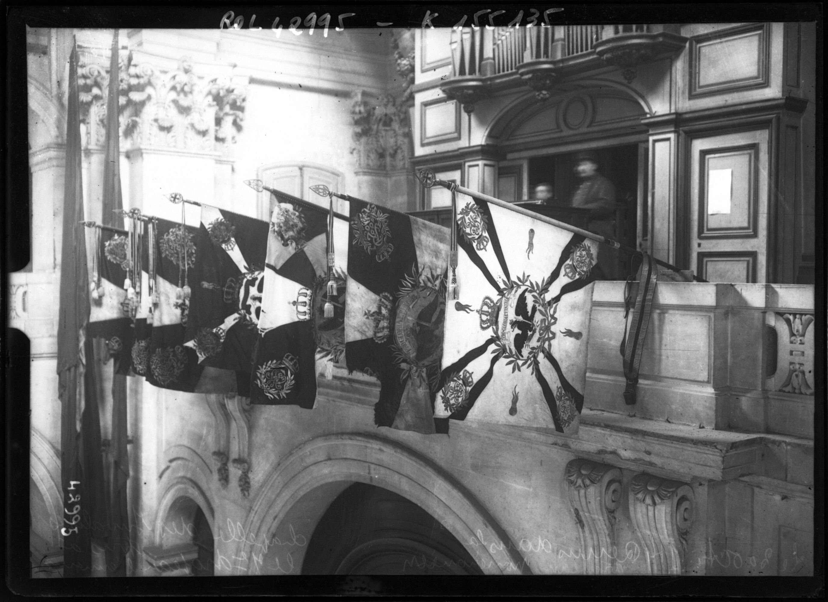 Exposition de sept drapeaux allemands dans la chapelle des Invalides à Paris en octobre 1914.